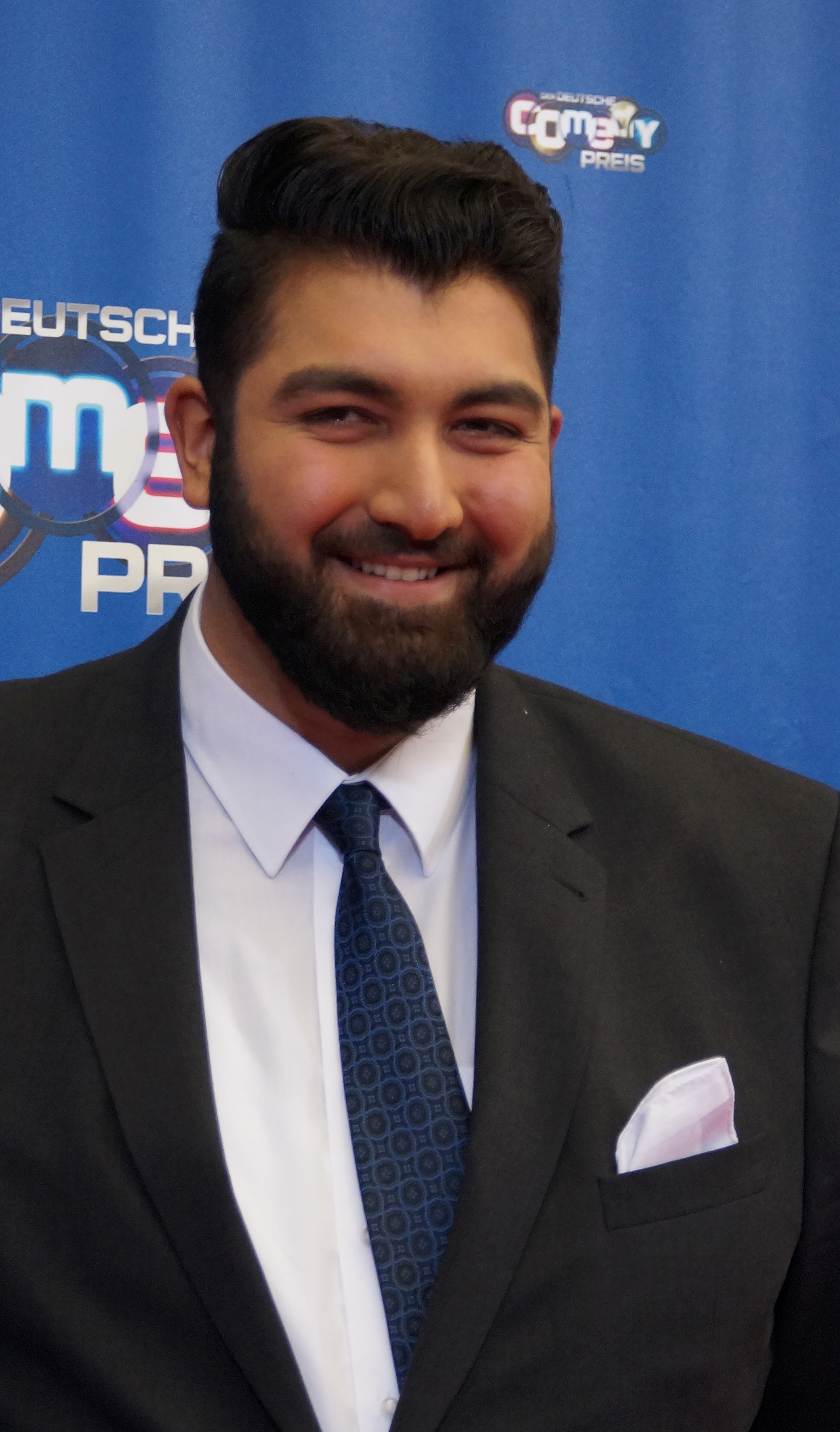 Faisal Kawusi beim Comedypreis 2016, im Oktober, Köln.